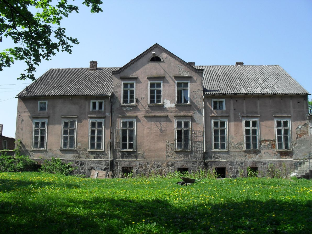 Dwór w miejscowości Pauliny, widok od strony wschodniej.